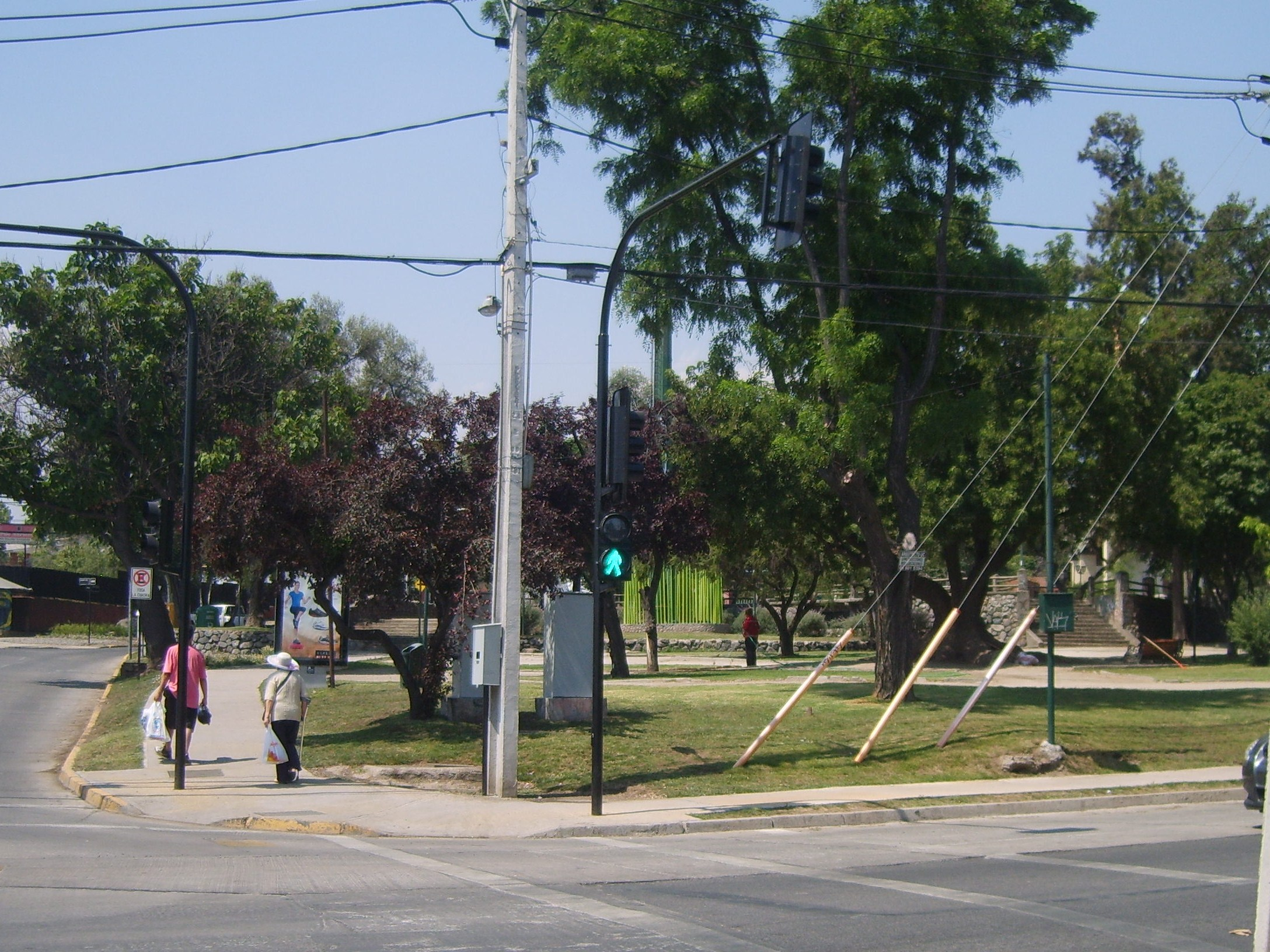 Plaza La Reina, en la comuna de La Reina, Santiago de Chile